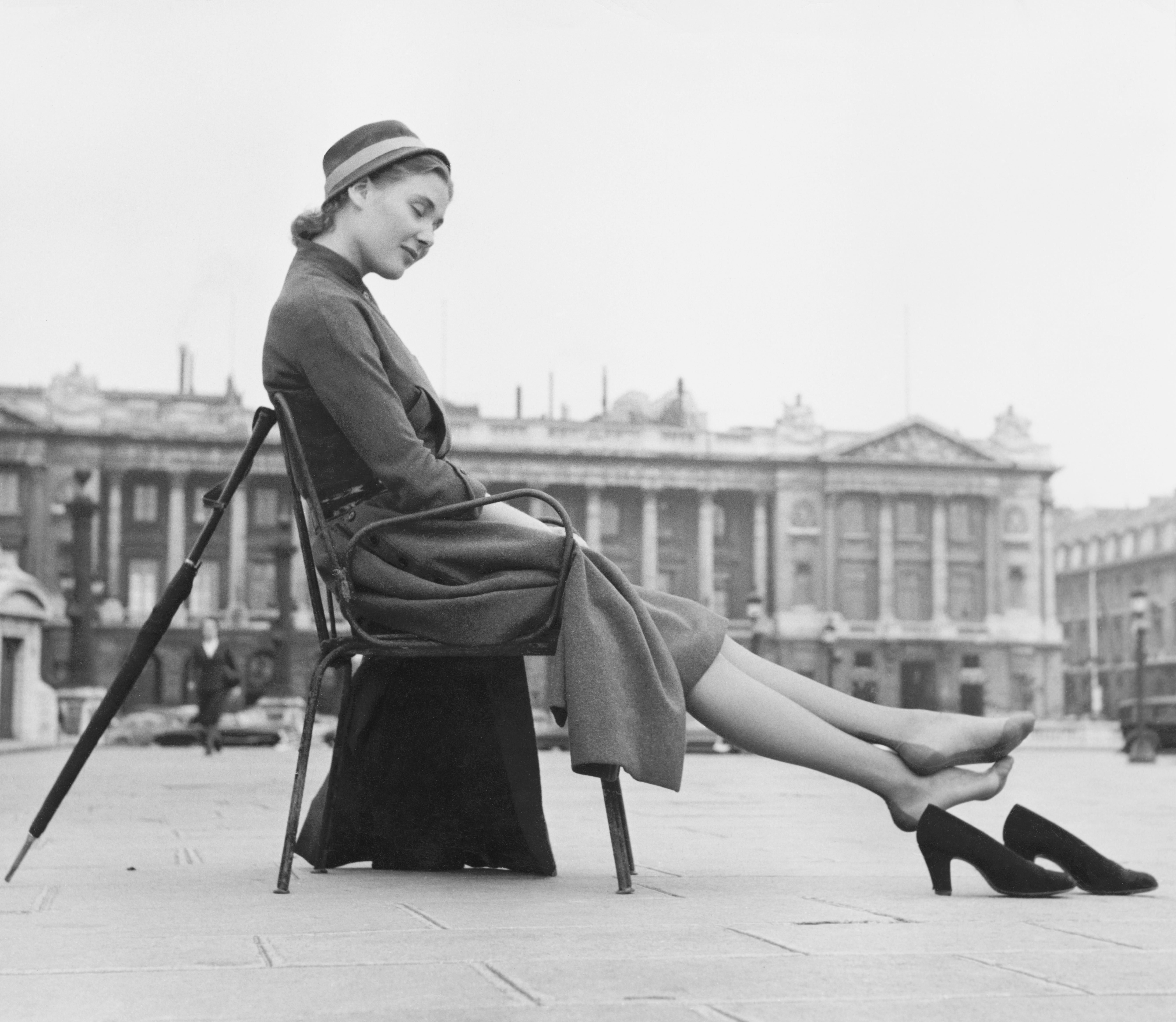 Kvinna i klänning och hatt sitter på en stol vid ett torg och har tagit av sig sina pumps. Mot stolsryggen står ett paraply lutat. Ämnesord: Kläder : Damkläder, Kläder : Skor, Mode, Stad.